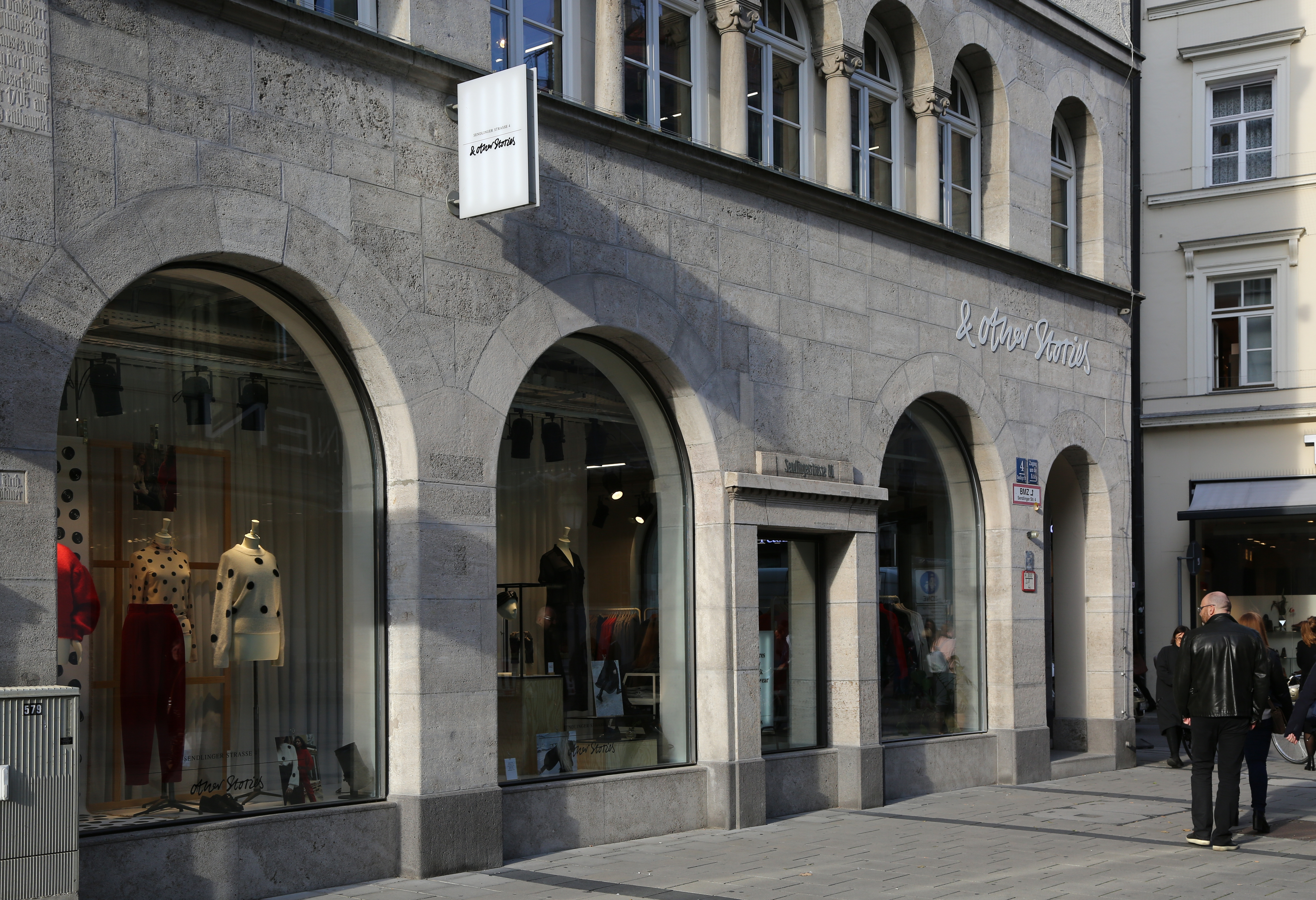 and other stories Filiale in München. Sendlinger Straße.